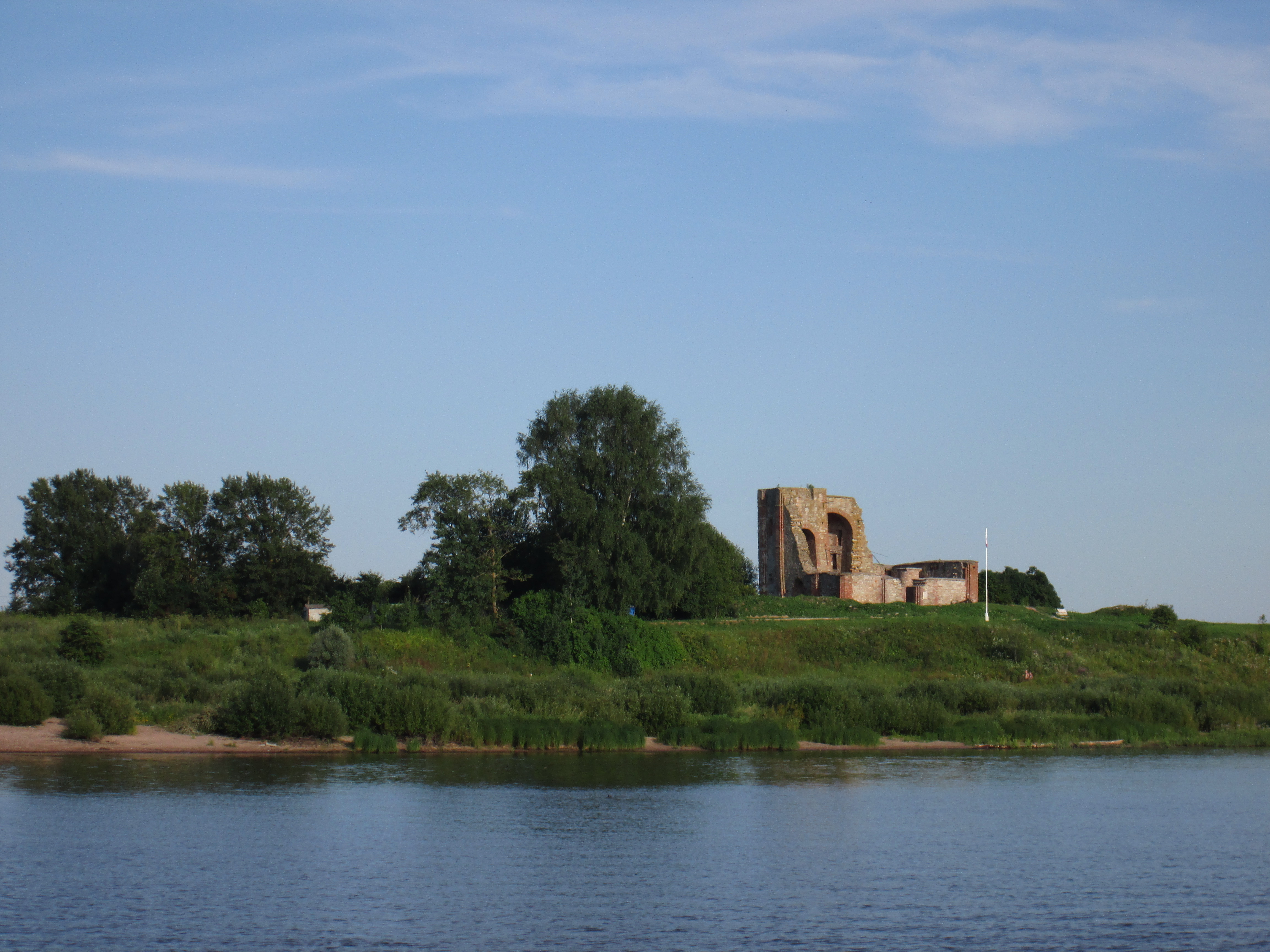 Рюриково Городище и руины церкви Благовещения. Вид с Волхова